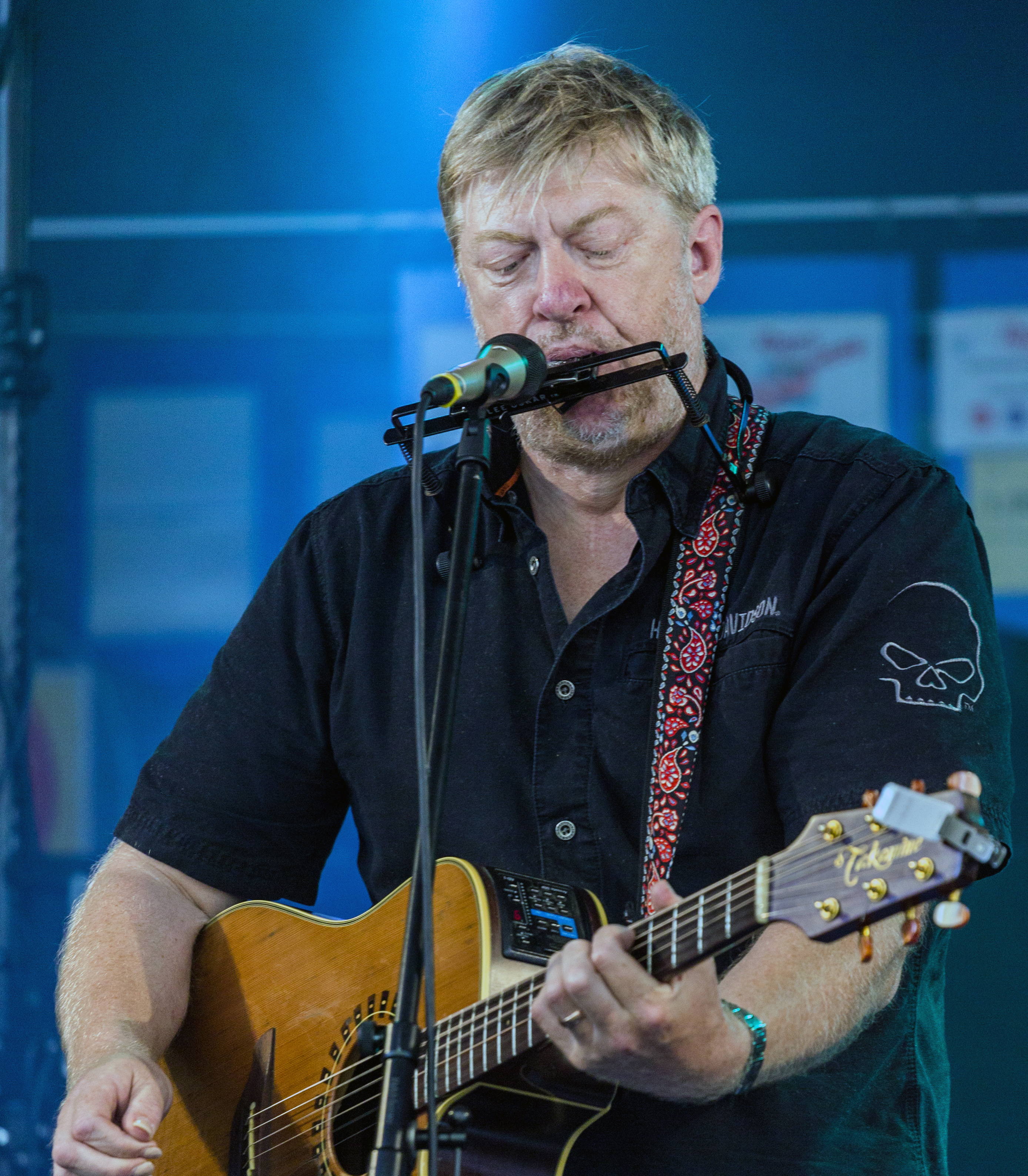 Paddy Schmidt mit Gitarre und Mundharmonia live in München